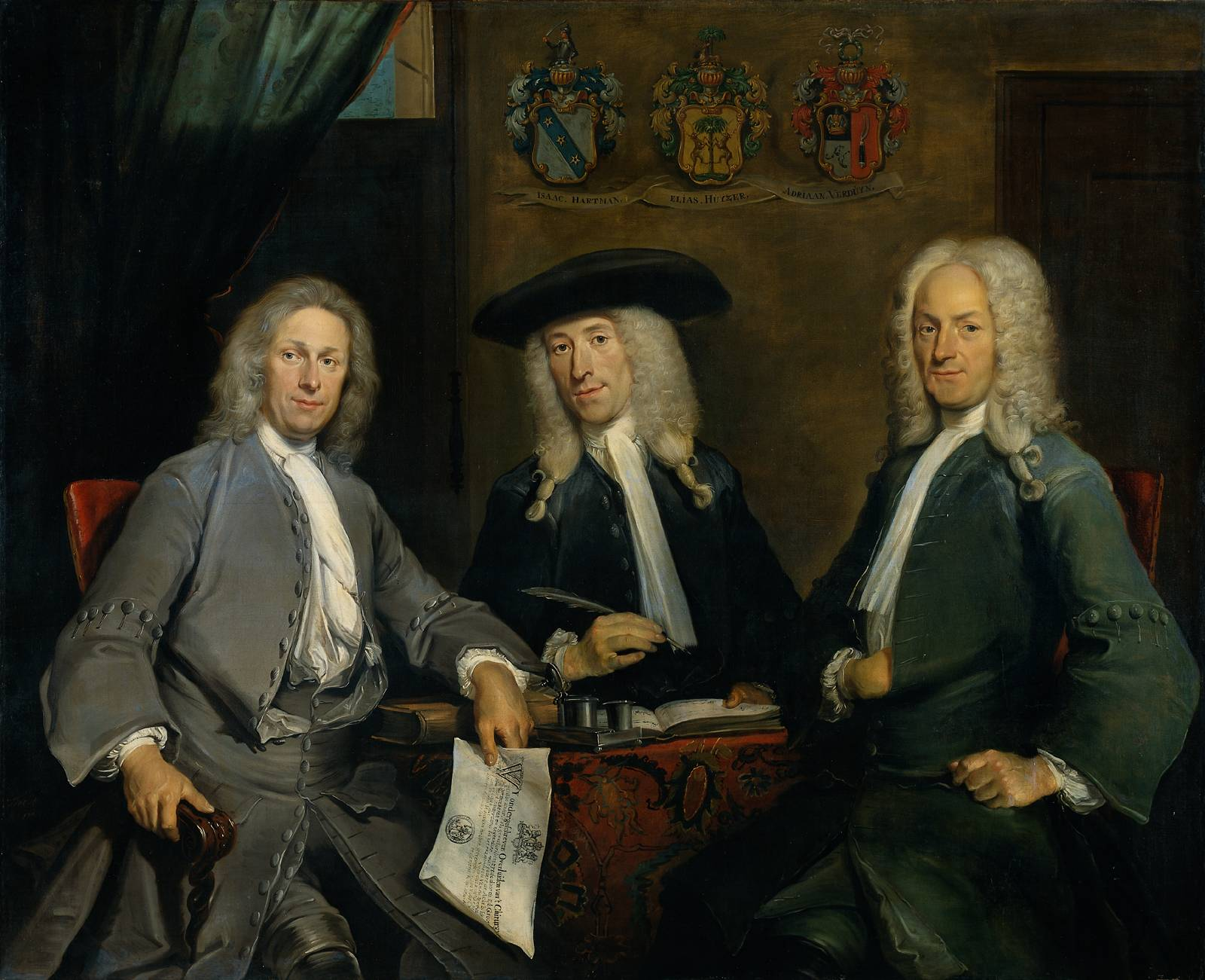 schilderij; Chirurgijnsgilde; portret; groepsportret; regentenstuk; Hartman, Isaac; Huijser, Elias; Verduijn, Adriaan Pietersz.